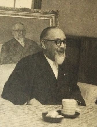 松本治一郎